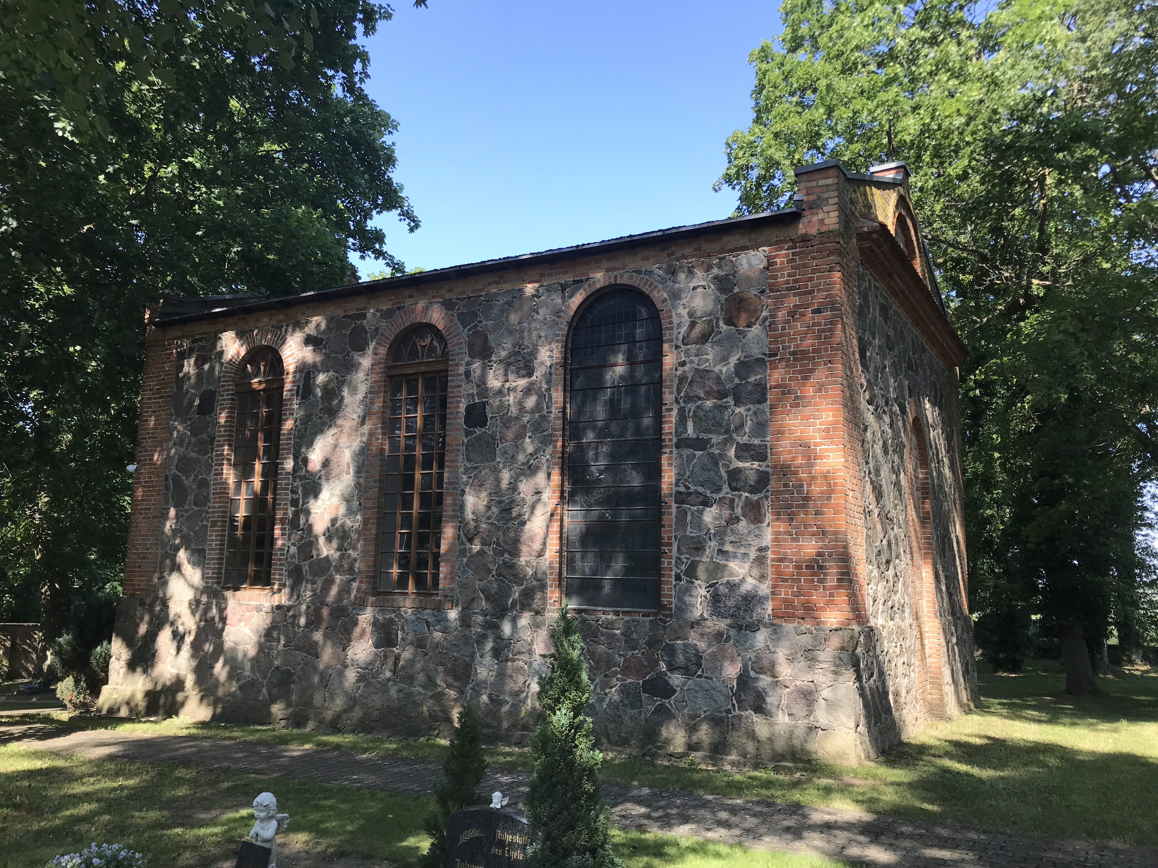 Die Dorfkirche Güterberg ist eine Saalkirche in Güterberg, einem Ortsteil der Gemeinde Uckerland im Landkreis Uckermark in Brandenburg. Die Kirchenausstattung ist bauzeitlich.